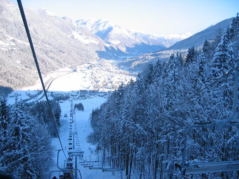 Smučišče v Kranjski gori (Sedežnica Vitranc 1)